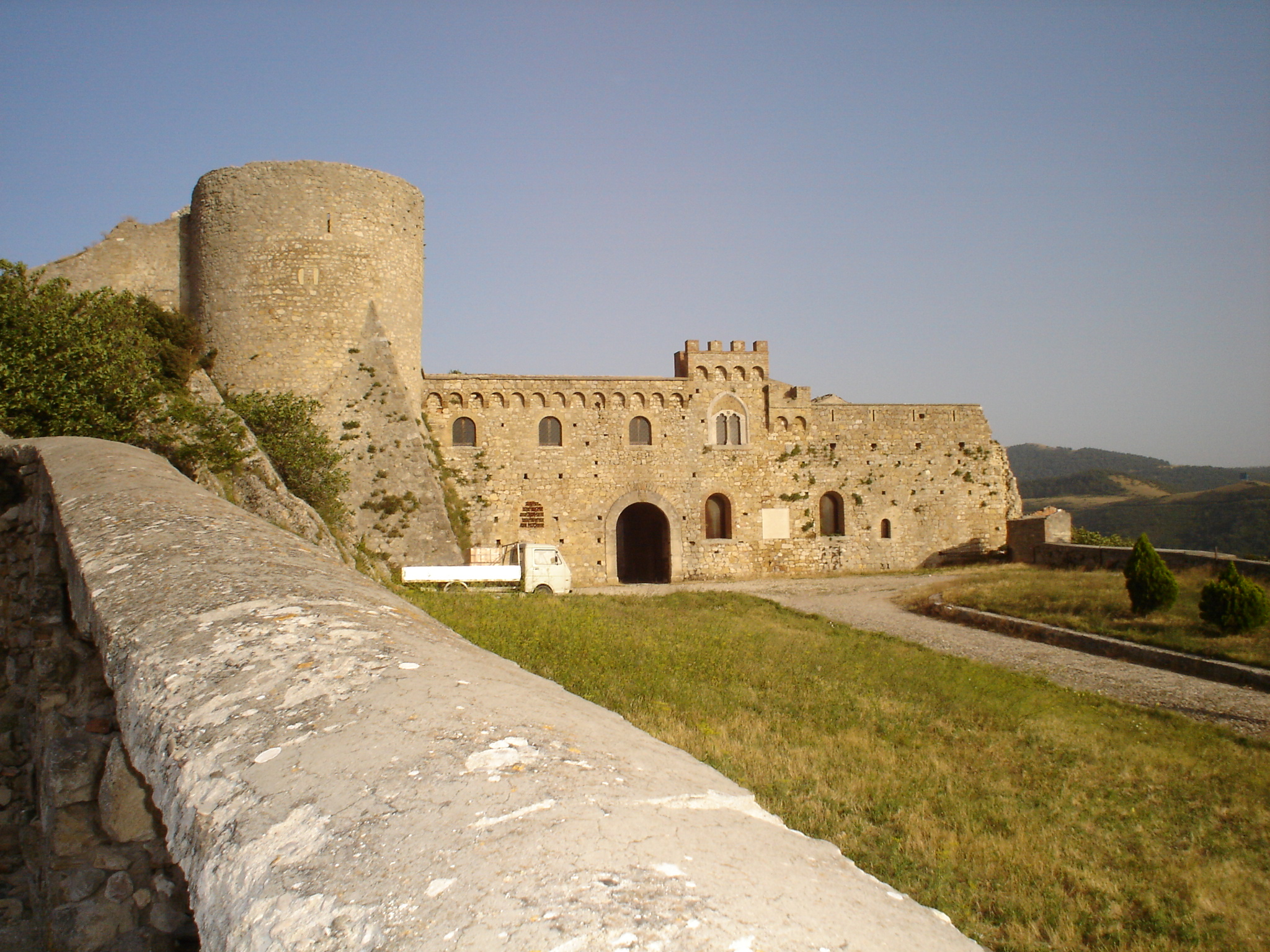 Kastelo de Bovino.